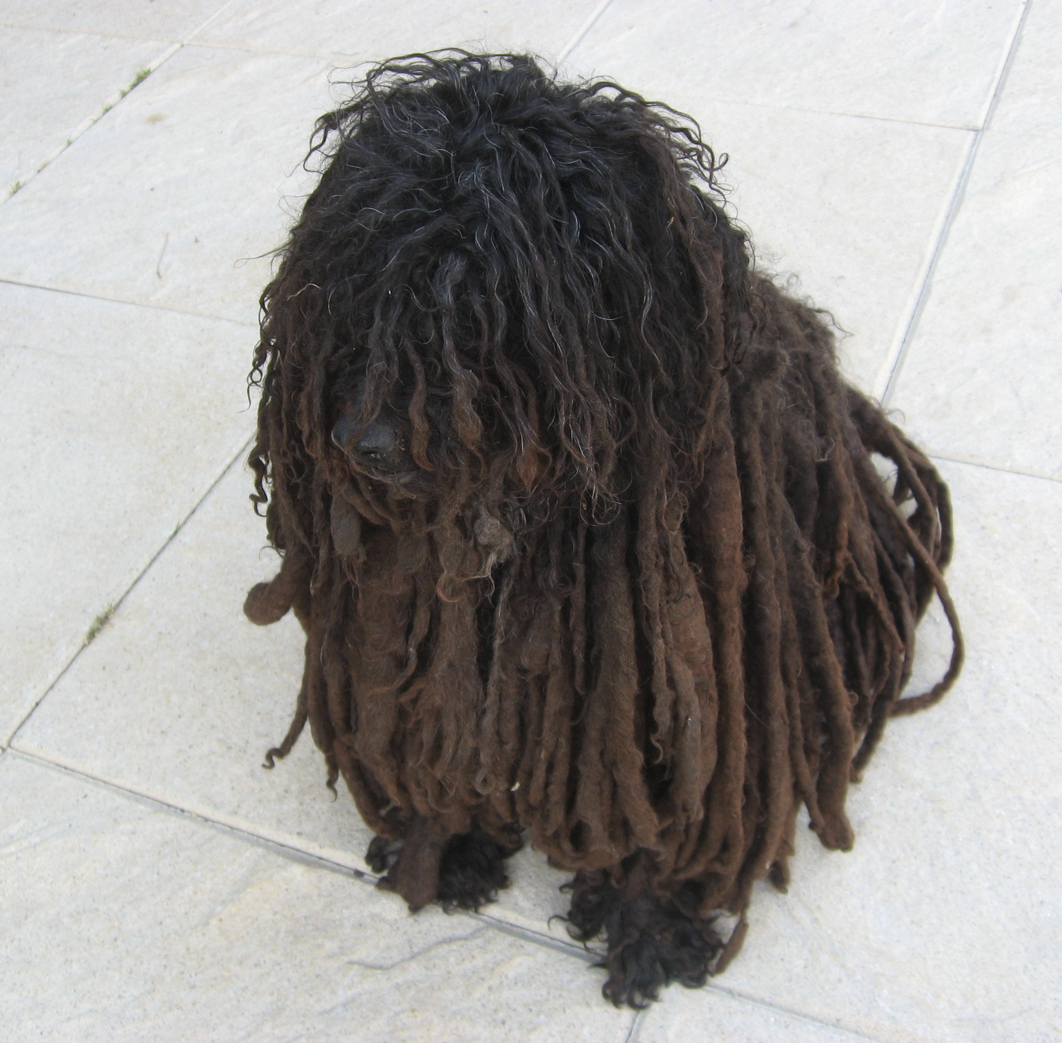 Hungarian Puli